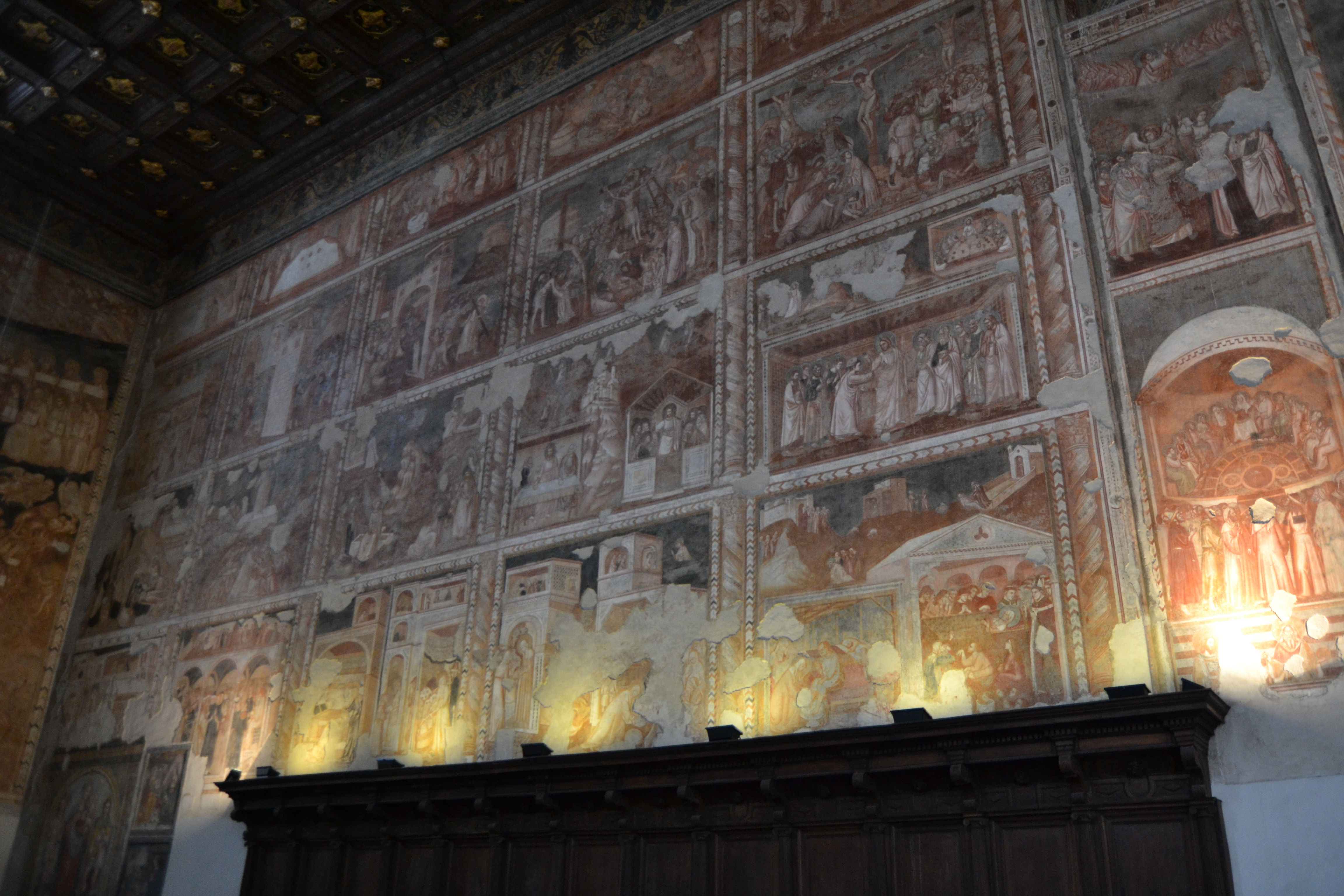 Chiesa di Santa Maria Donnaregina Vecchia (Napoli) - Coro delle monache: parete orientale